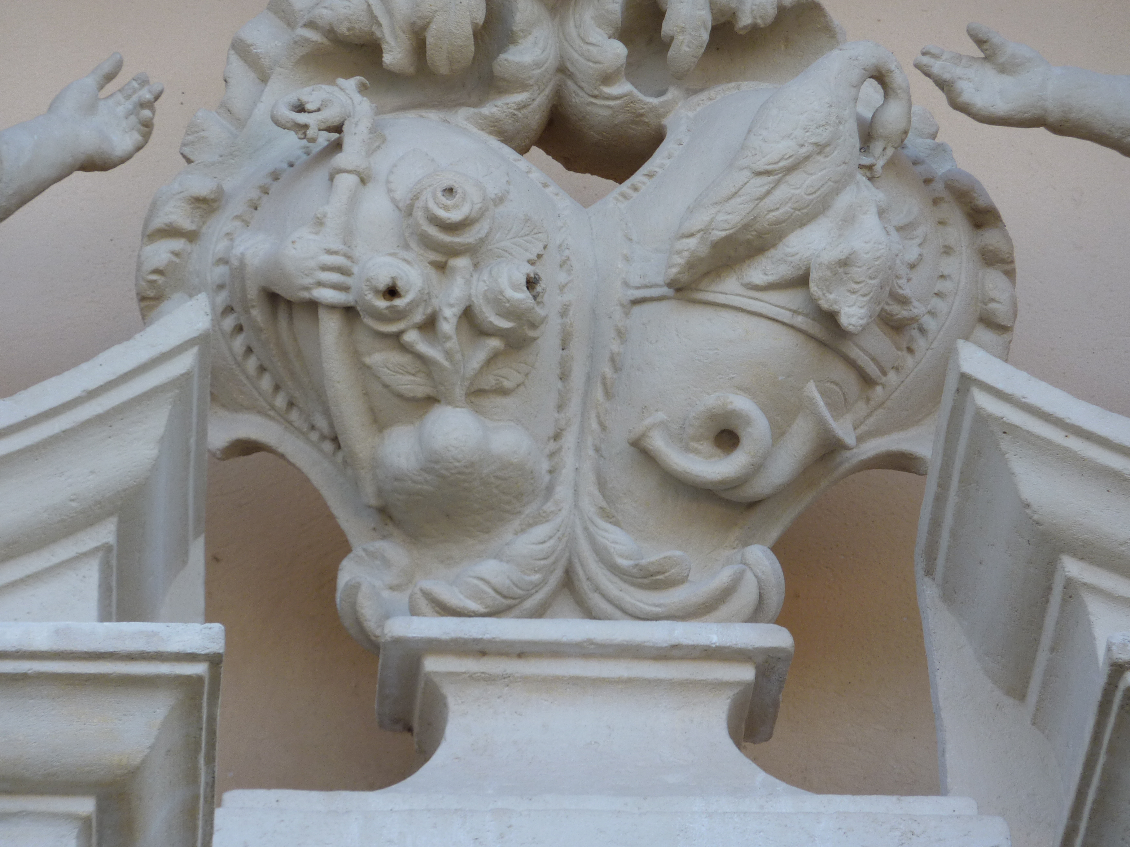 Stift Altenburg, Abt-Placidus-Much-Straße 1, Altenburg, Niederösterreich - Abtwappen auf dem Epitaph für Abt Maurus Boxler (gest. 1681) außen in einer Erdgeschoßnische der Stiftskirche